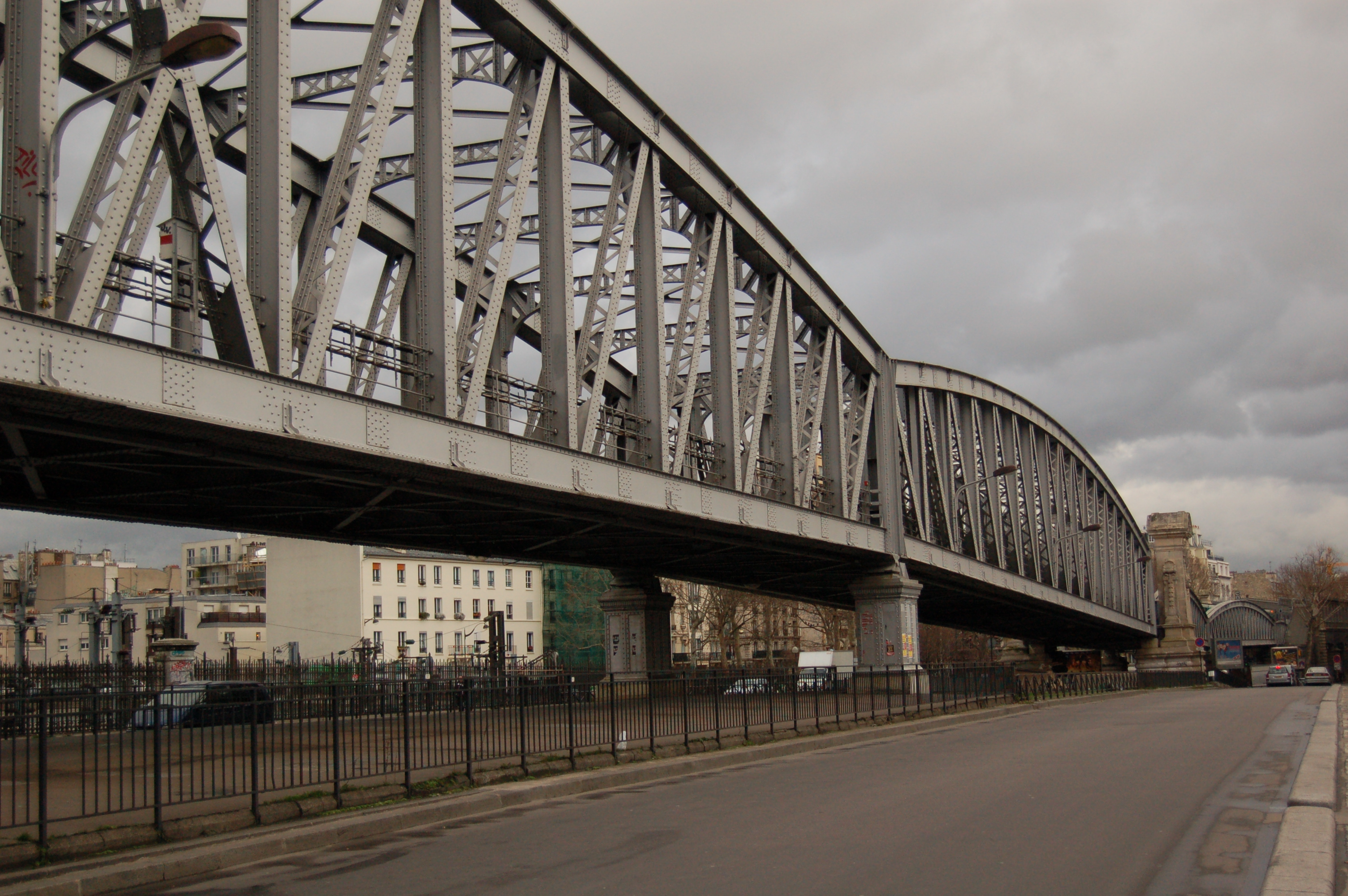 Pont aérien du métro parisien entre Barbès Rochechouart et La Chapelle